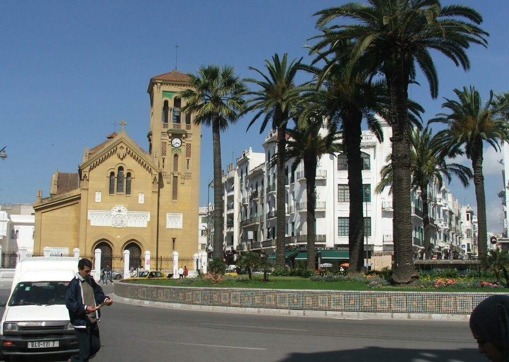 Iglesia de Nuestra Señora de la Victoria y plaza de Muley el Mehdi (Tetuán)